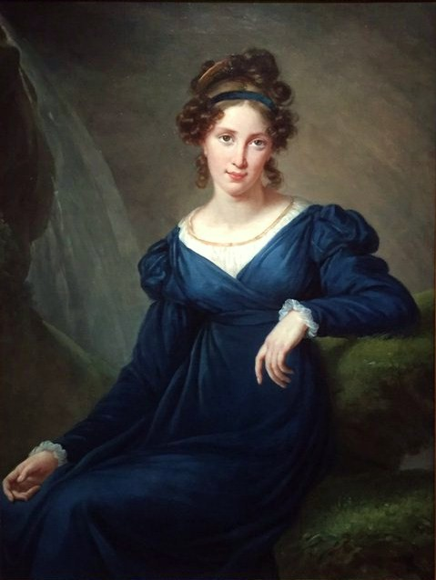 Татьяна Борисовна Потемкина (1797-1869), ур. Голицына